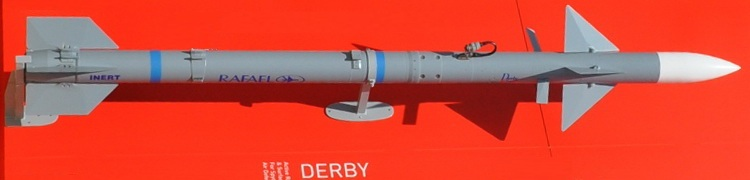 Derby missile at Salon du Bourget 2011.